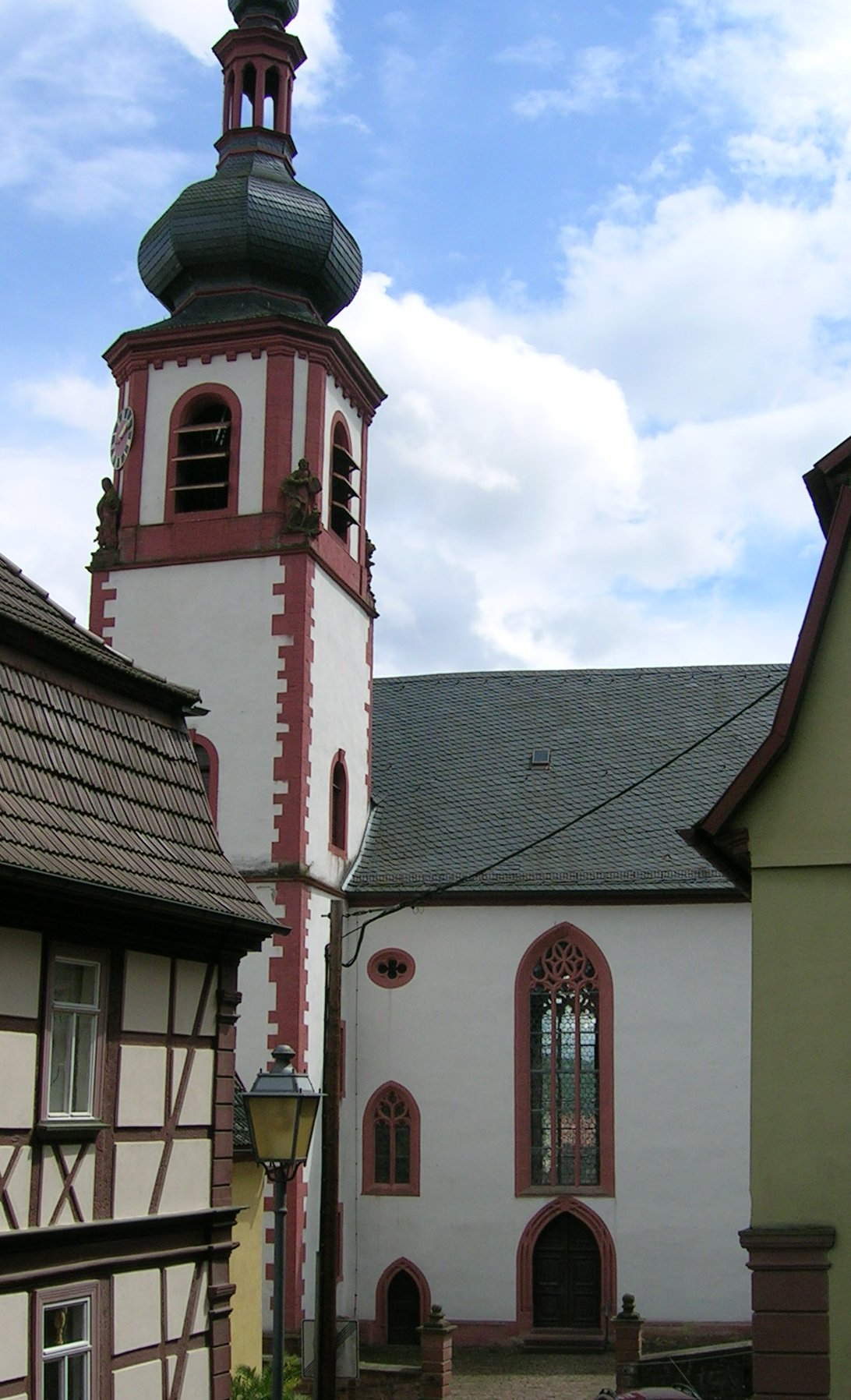 wie der Bildtitel sagt